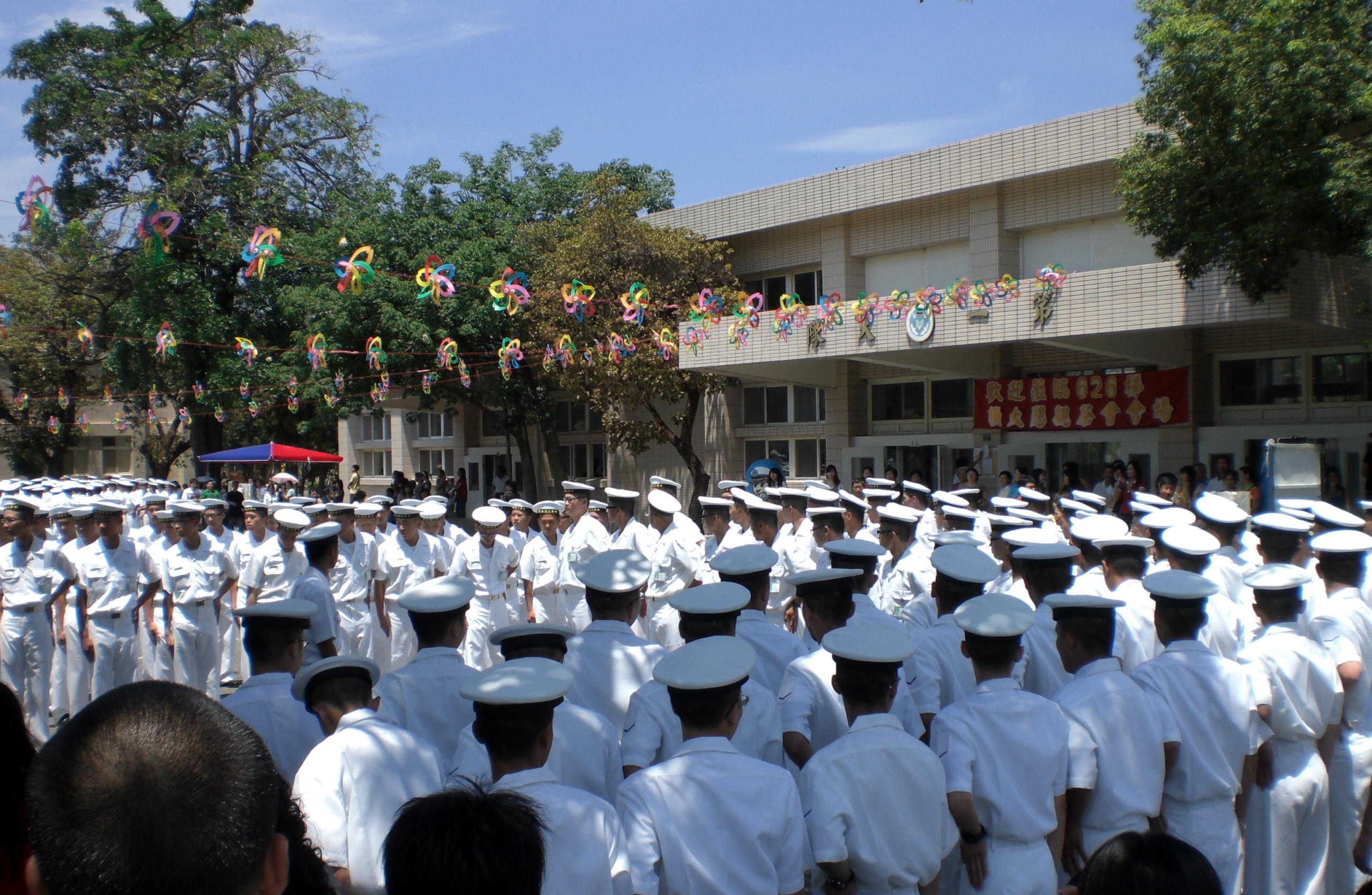 2008年5月4日，中華民國海軍新兵訓練中心626梯擴大懇親茶會（簡稱「大懇」），新兵第一大隊各中隊於第一大隊餐廳前廣場集合點名，新兵第一大隊第二中隊當值班長喊口令「向右看齊」整隊。海軍新兵訓練中心本日規定服裝：白色丙式軍常服（簡稱「白丙」）。